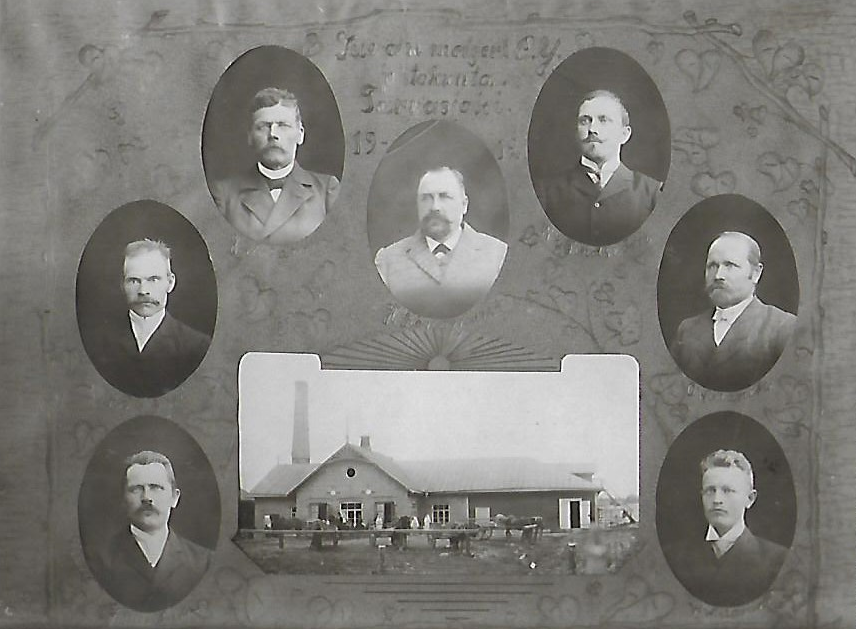 Johtokunta, Verner Virtanen alimmaisena oikealla